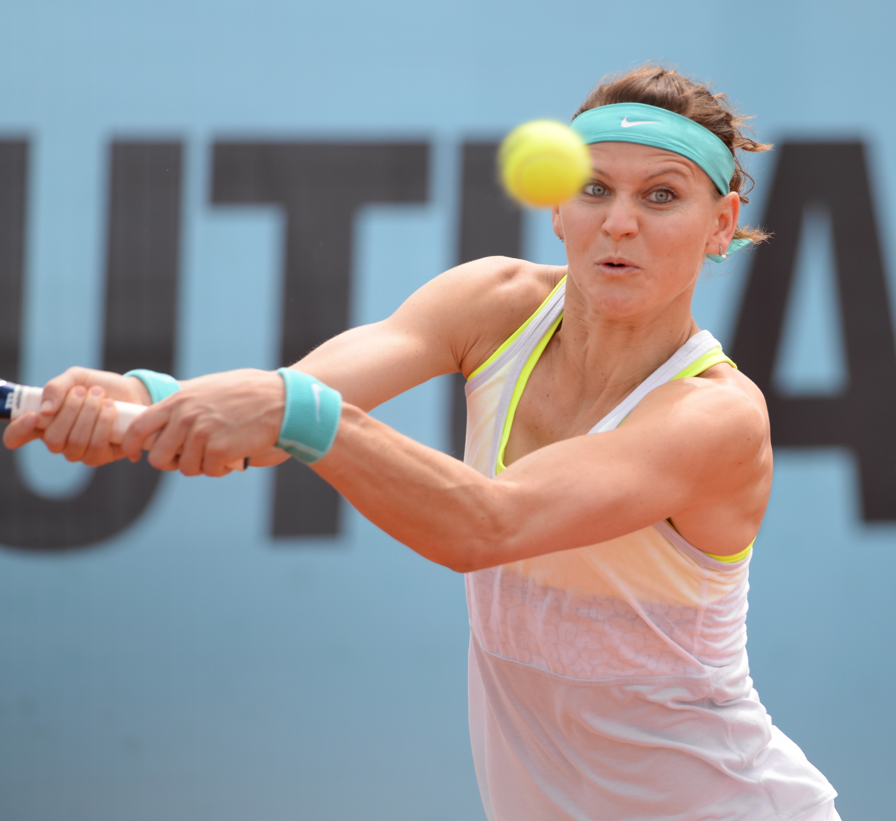 Lucie Safarova